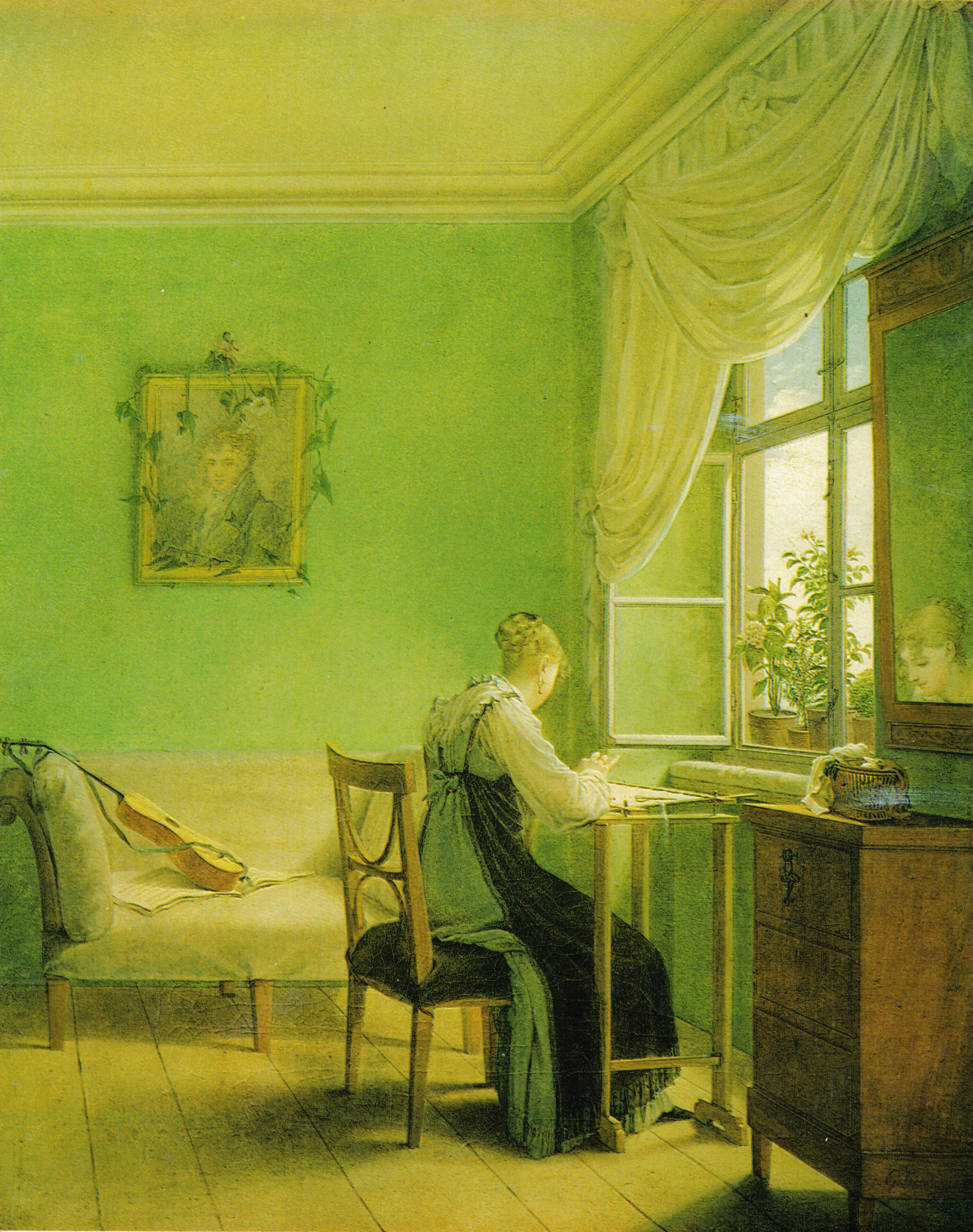 Erste Fassung 1812. Dargestellt ist Louise Seidler.